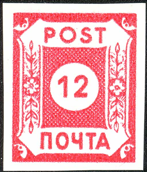 Briefmarke Ost-Sachsens (OPD Dresden), die am 23. Juni 1945 erschien: „POSCHTA“ in 12 Pfg rot.